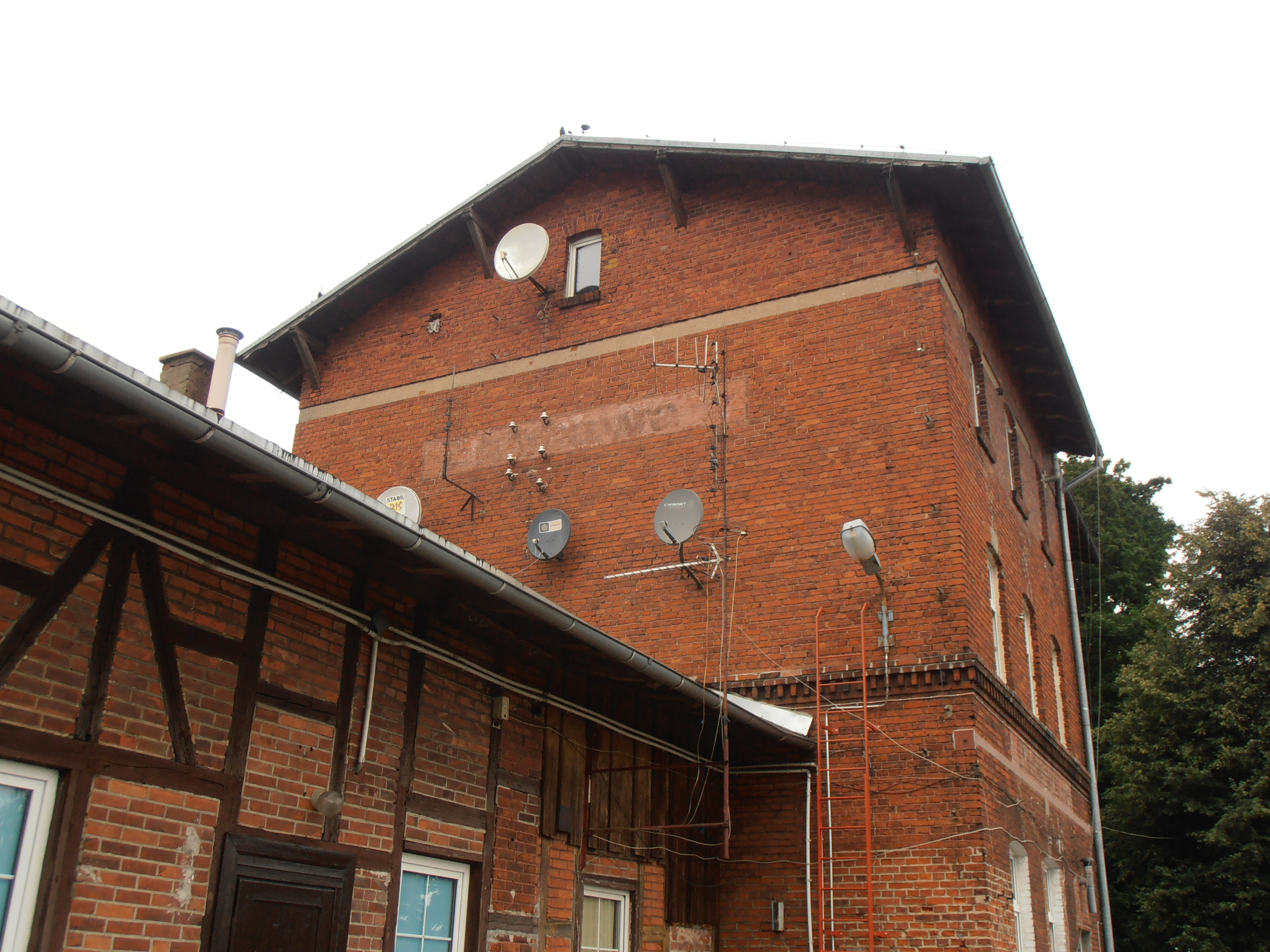 Lubawa (woj. warmińsko-mazurskie). Budynek dworca kolejowego, obecnie dom mieszkalny.